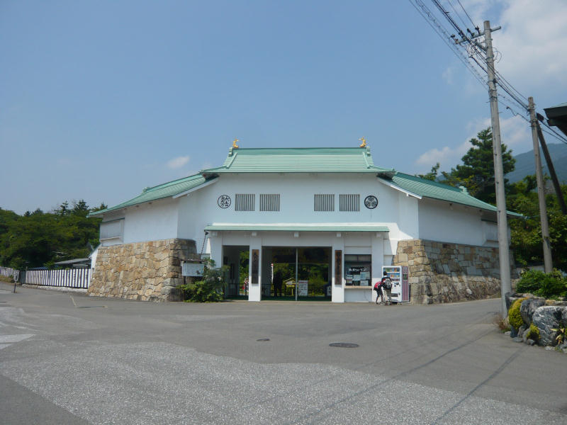 関ヶ原ウォーランド入口